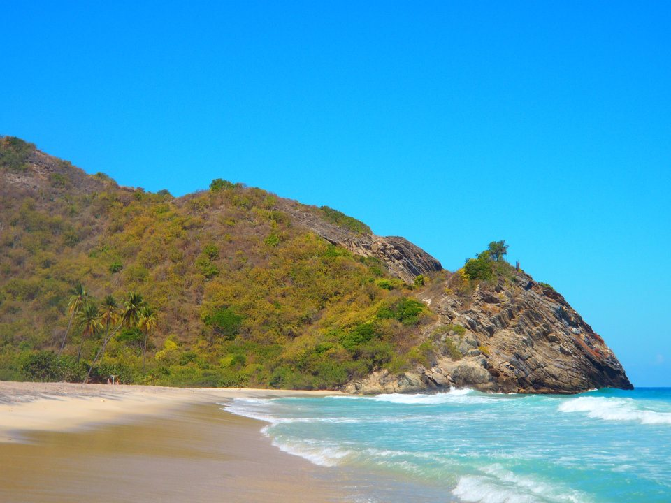 Playa de Cuyagua, estado Aragua - Venezuela 2009